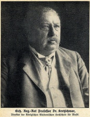 Geheimer Regierungsrat Prof. Dr. Hermann Kretzschmar, Direktor der Königlichen Akademischen Hochschule für Musik